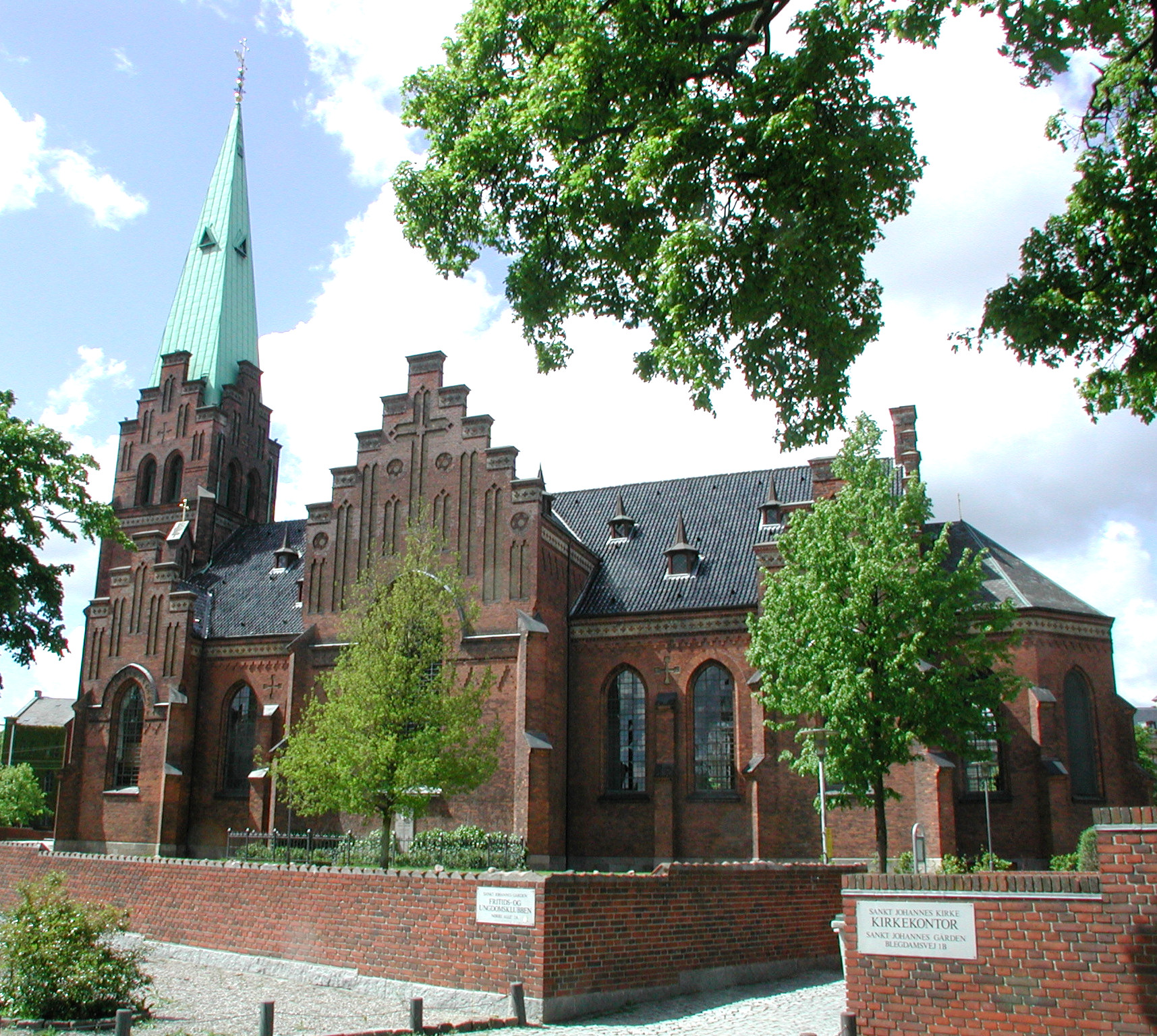 Sankt Johannes Kirke in Copenhagen, Denmark. View from side.